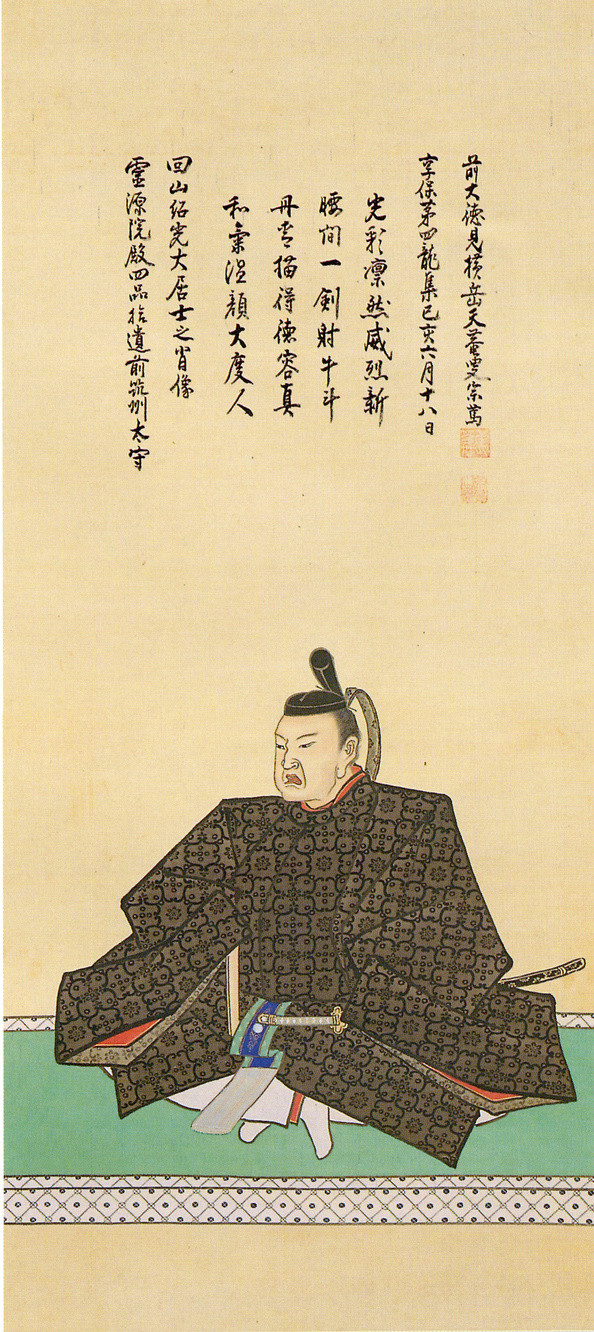 黒田綱政の肖像。